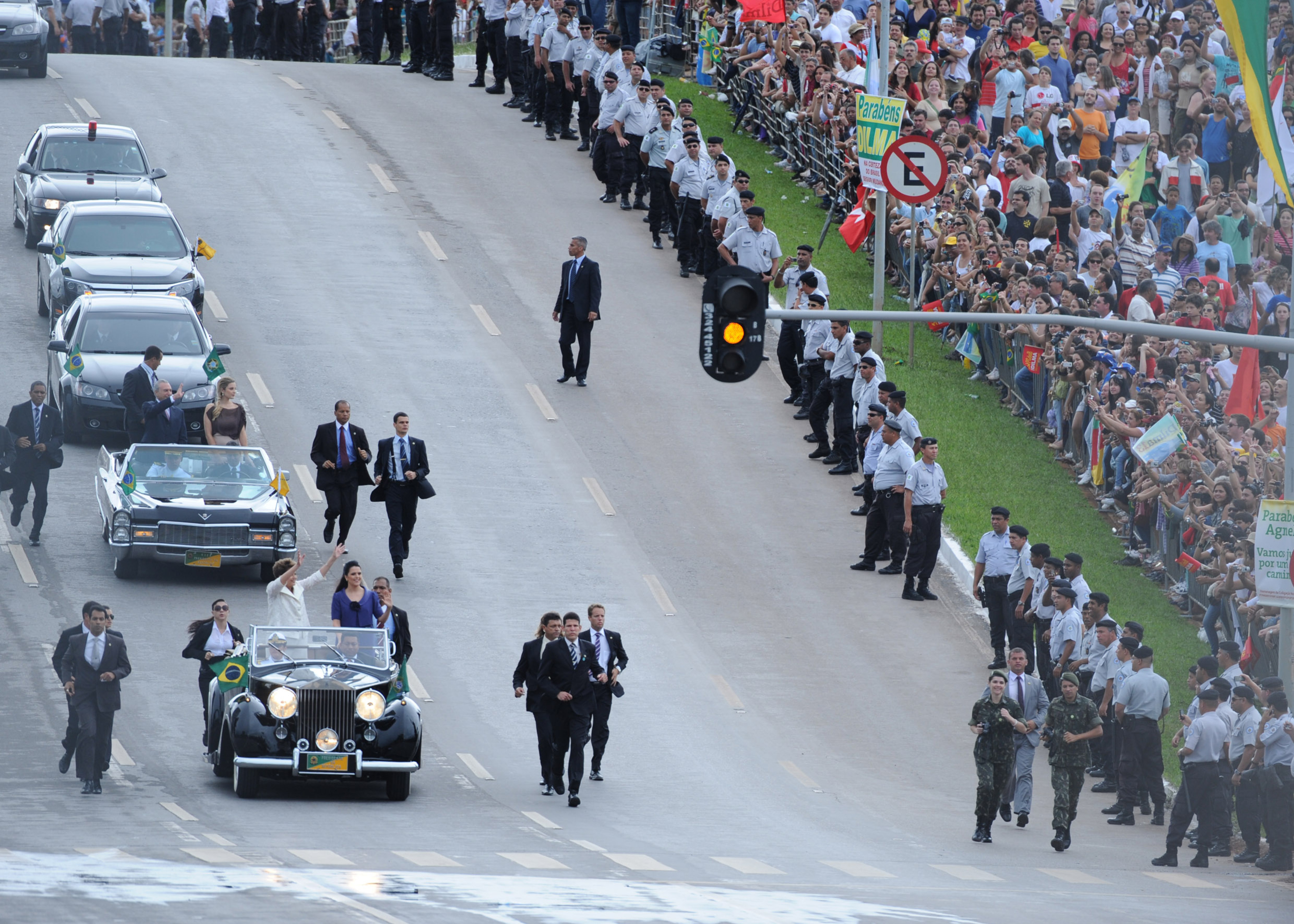 A presidenta Dilma Rousseff desfila no Rolls Royce presidencial ao lado de sua filha Paula Rousseff, em direção ao Palácio do Planalto. Brasília, 1º de janeiro de 2011.